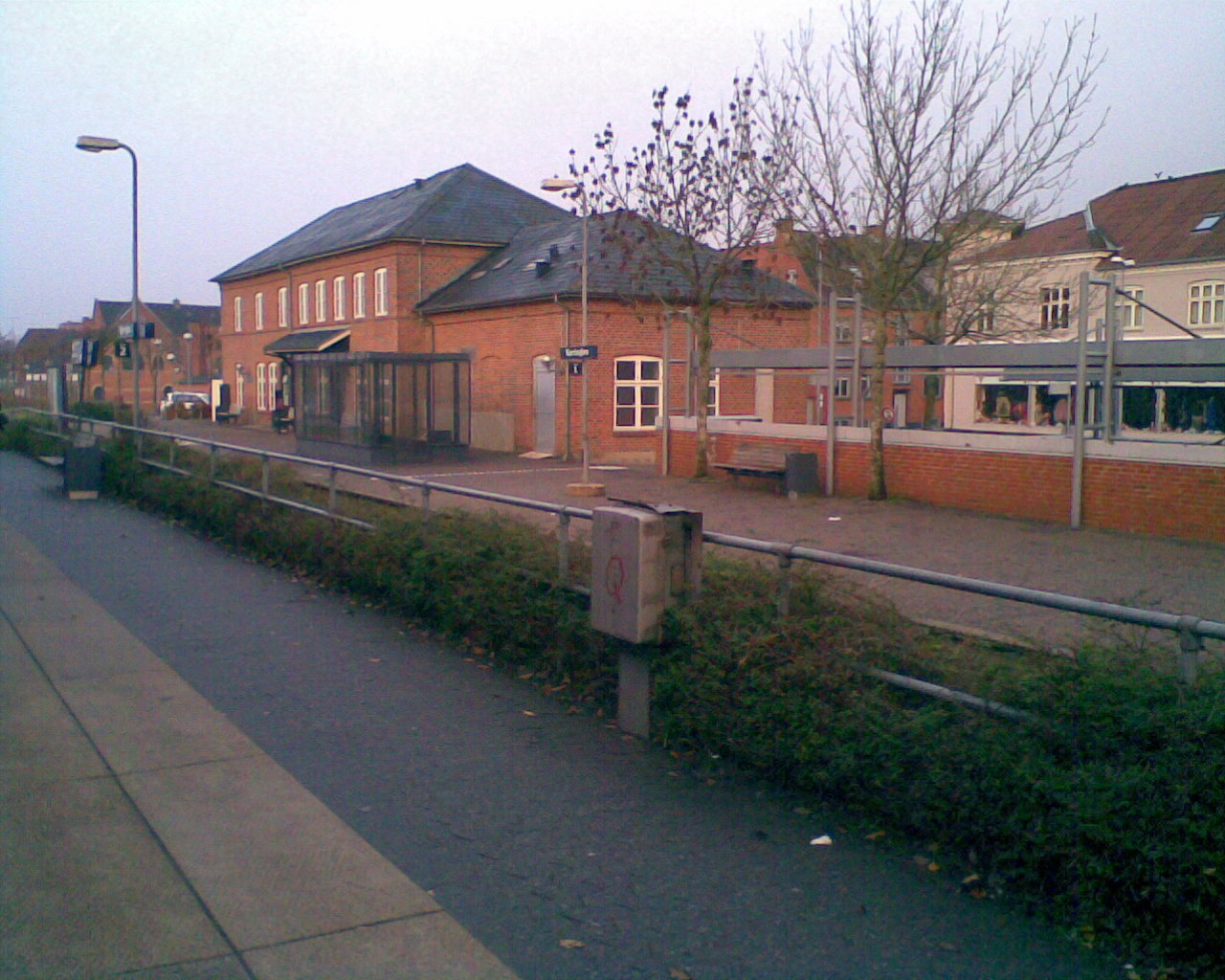 Bjerringbro Station